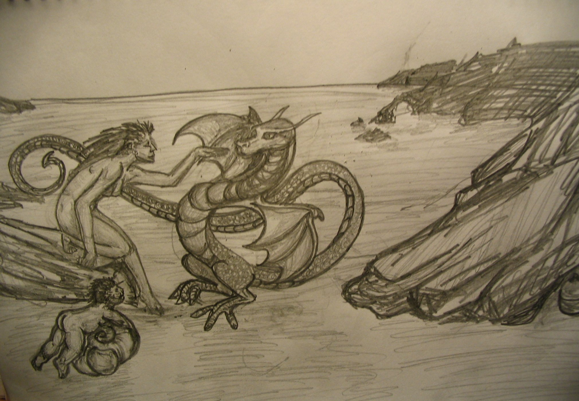 Figures mitolóxiques asturianes: ayalga, cuélebre y ventolín